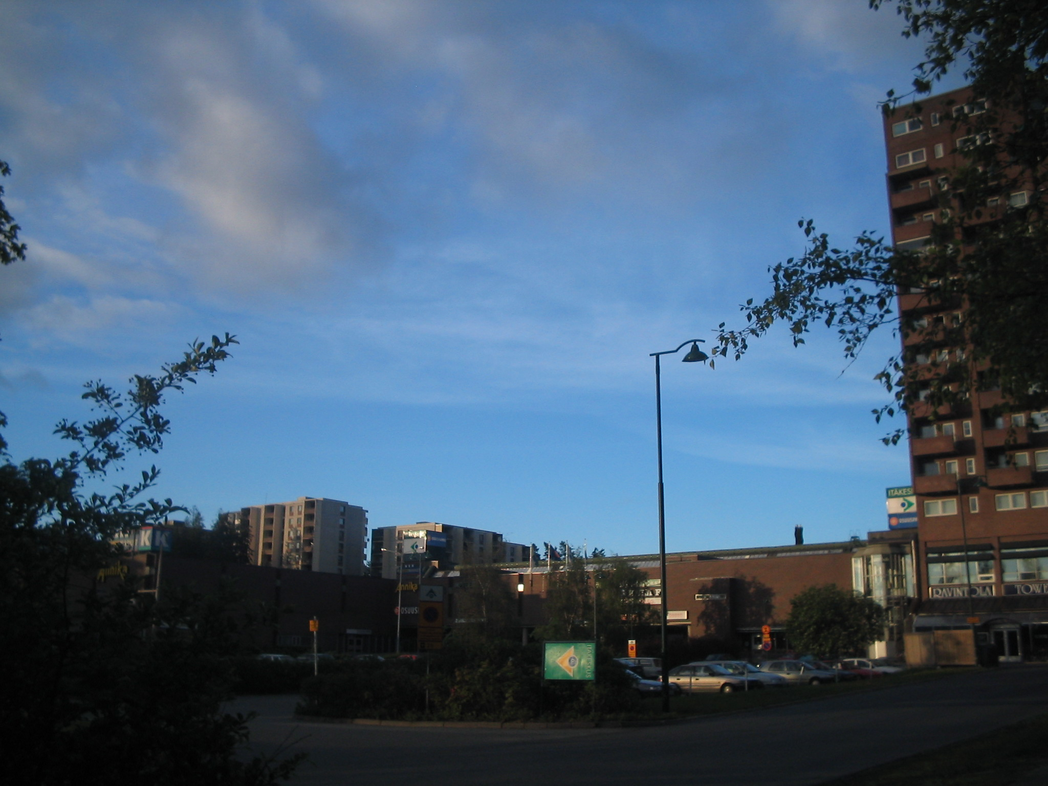 Varissuo